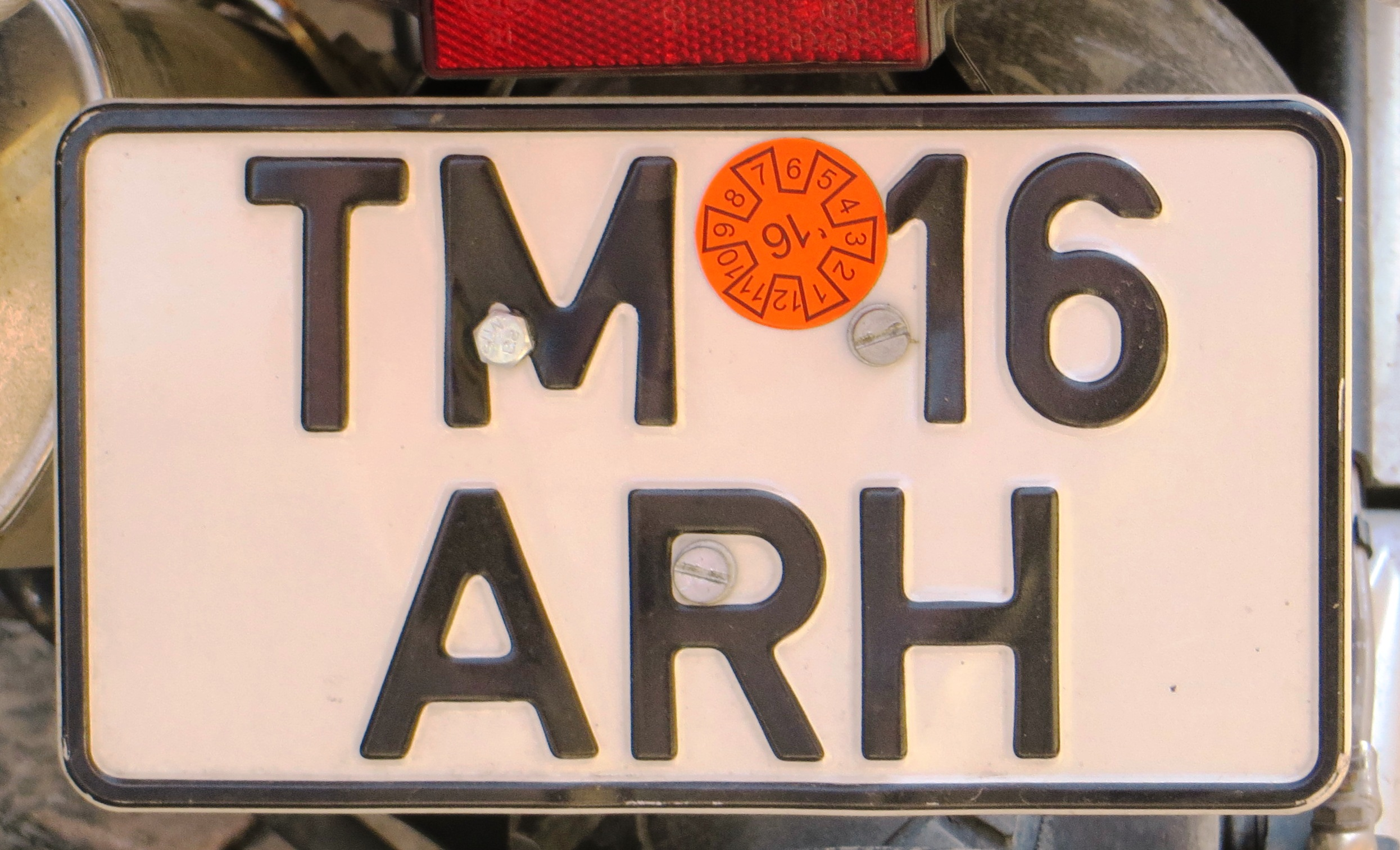 kentekenplaat uit Roemenië - Timișoara